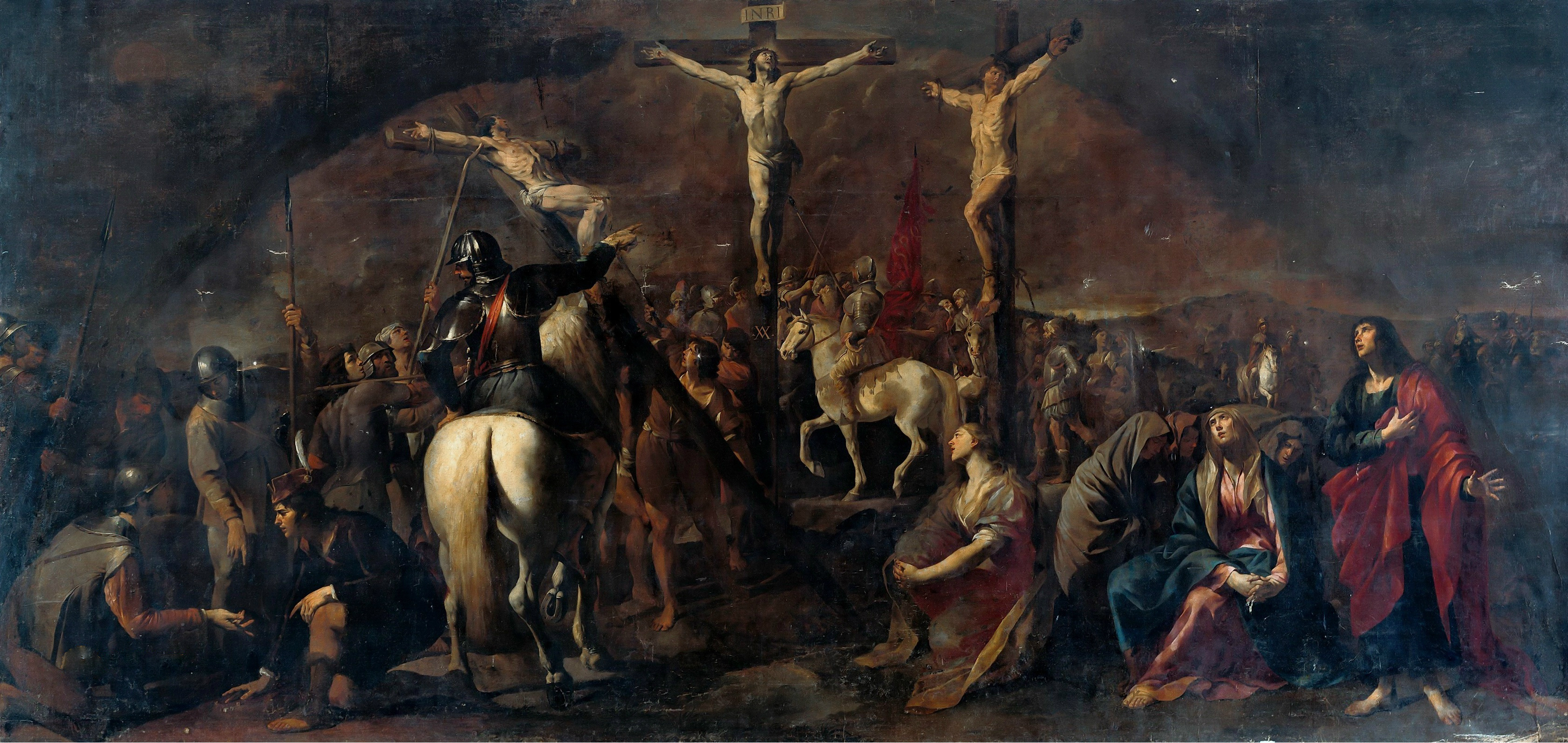 Crocifissione